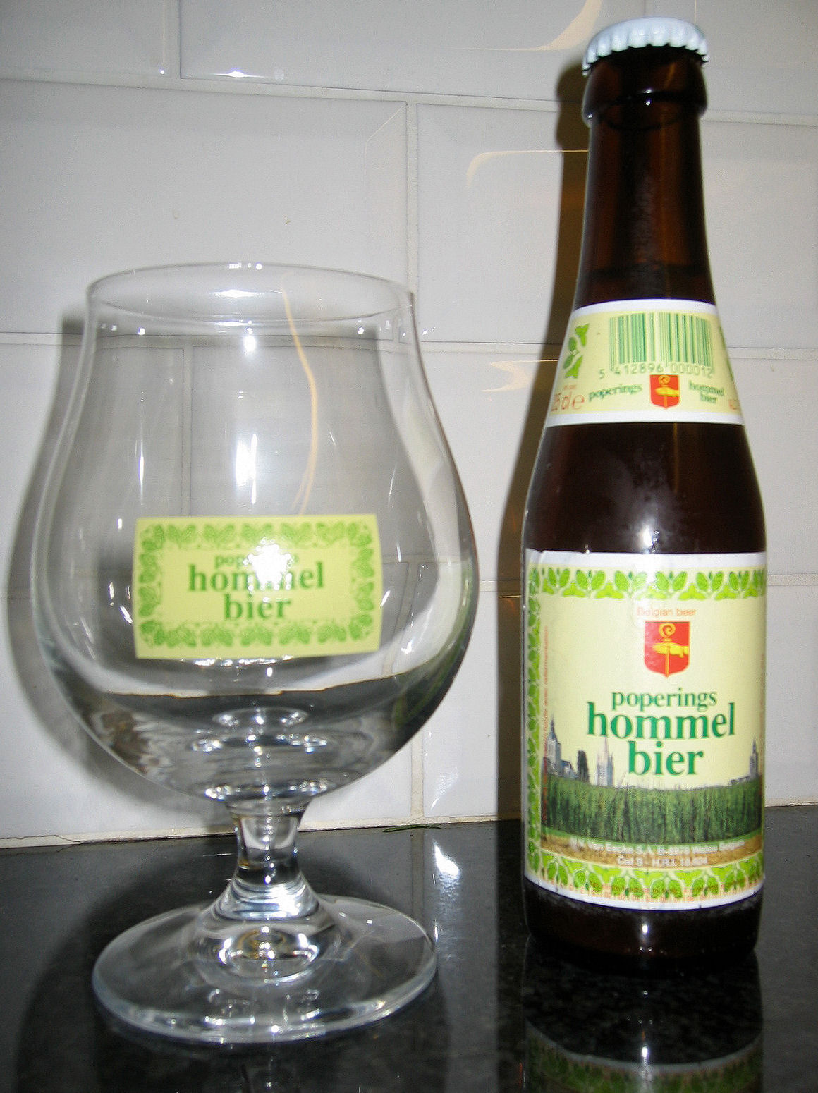 Zelfgemaakt (en dat valt eraan te zien). Rechtenvrij dus. User:astro dd 10/12/2006